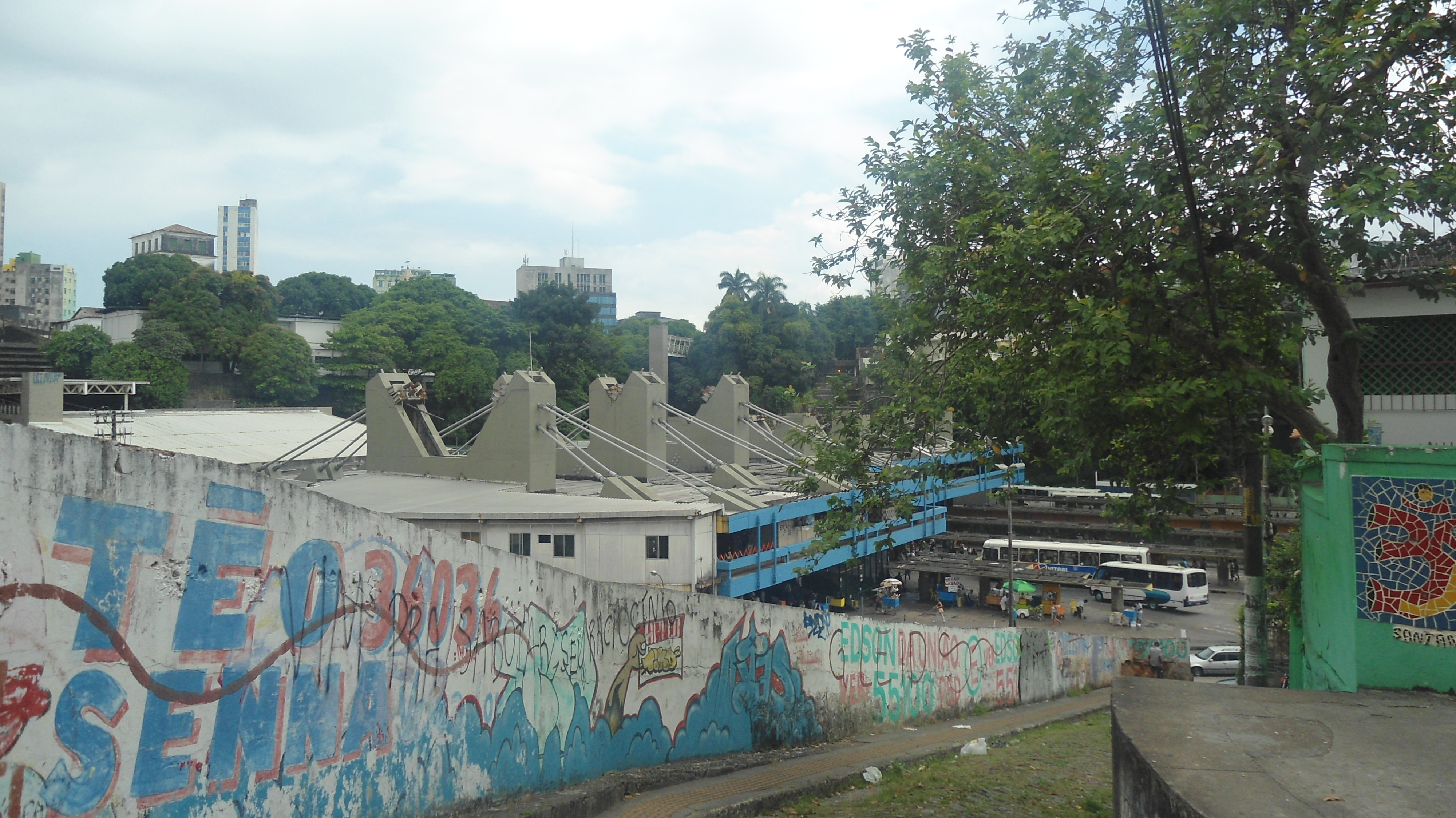 Foto tirada em janeiro de 2014 em Salvador, Bahia, durante mapeamento da cidade no OpenStreetMap pelo Wikiday.